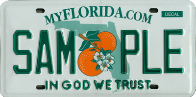 Florida license plate